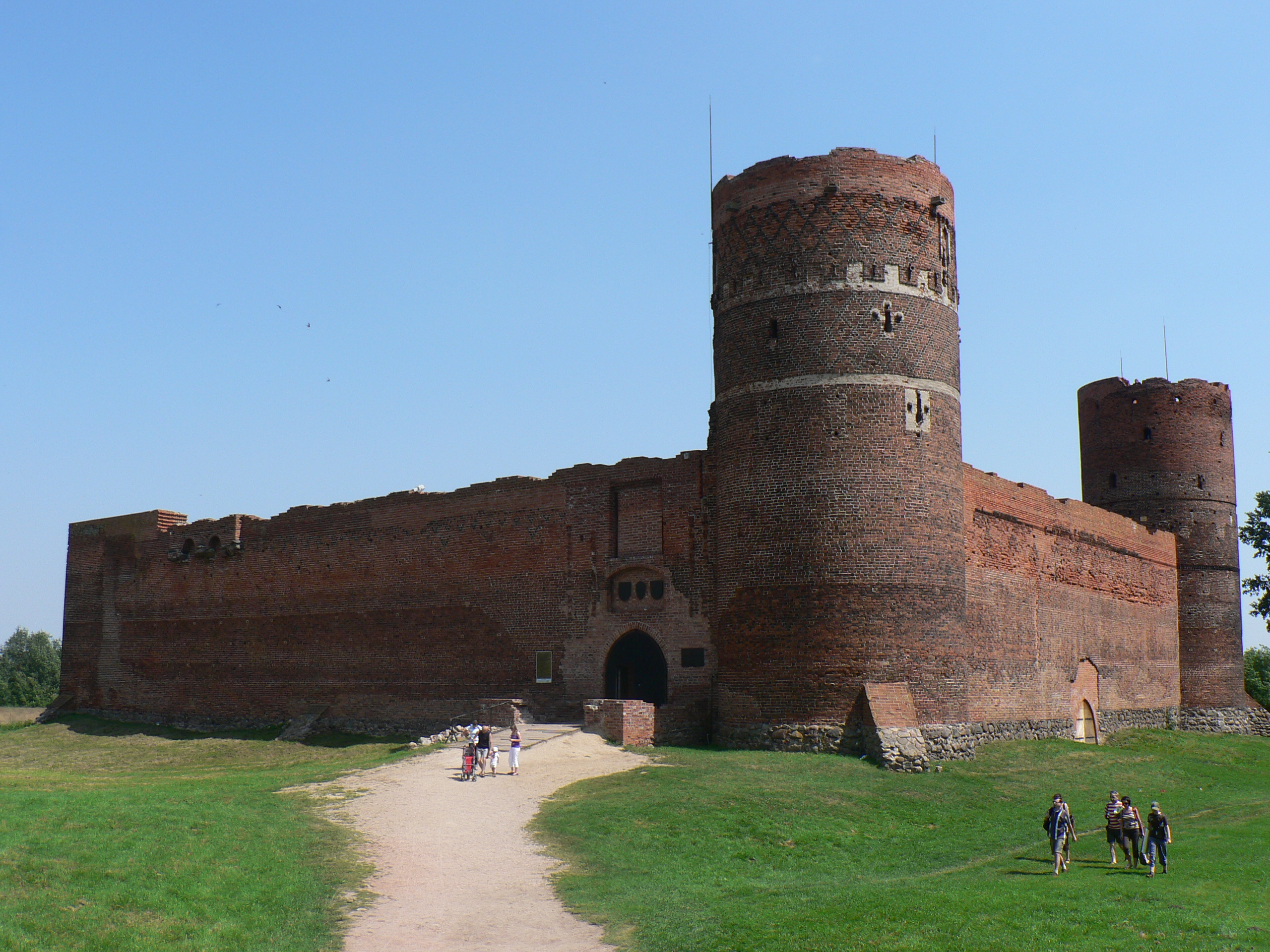 Zamek Książąt Mazowieckich w Ciechanowie